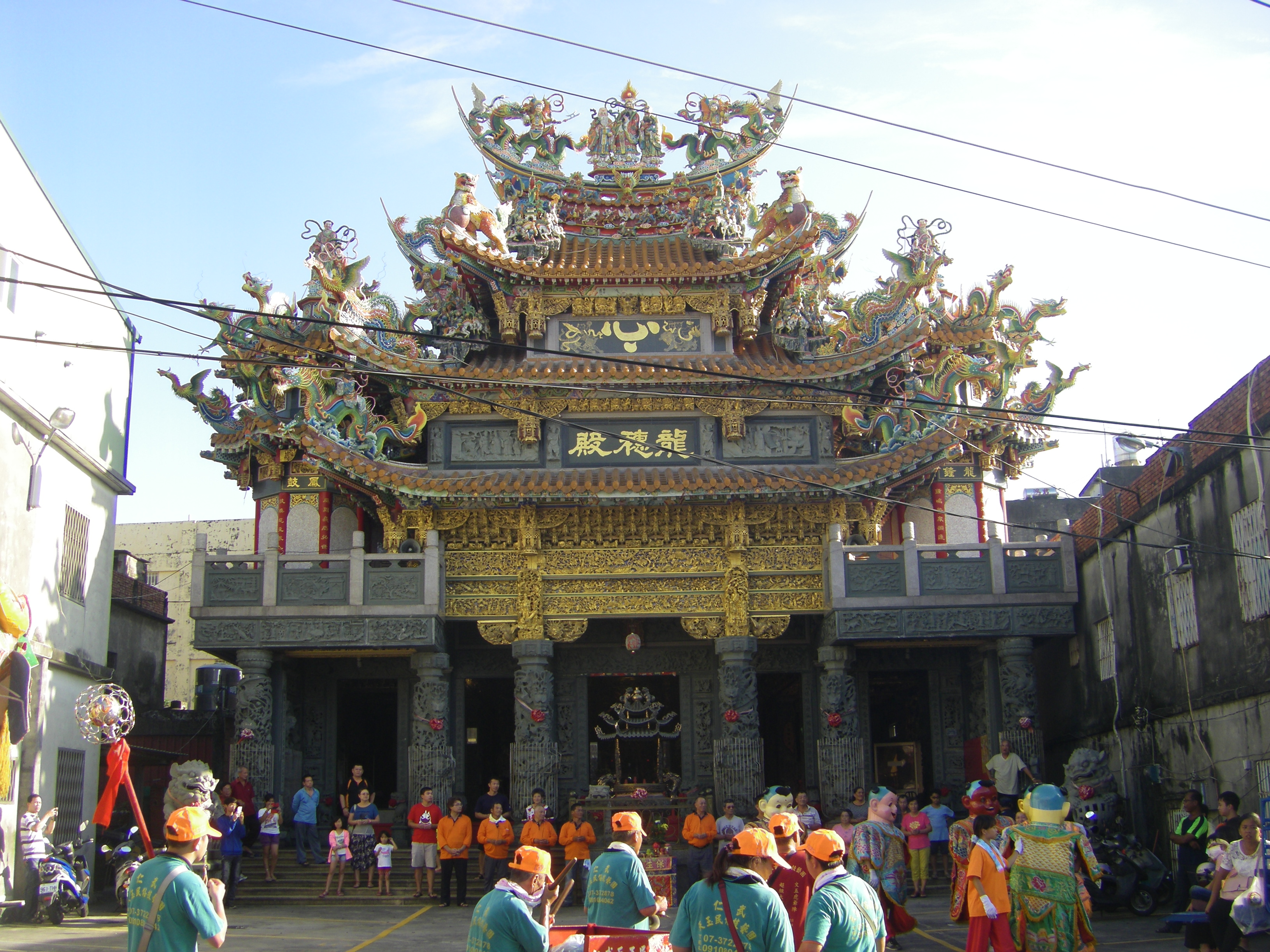 中文（台灣）: 位於高雄市梓官區的赤崁龍穗殿